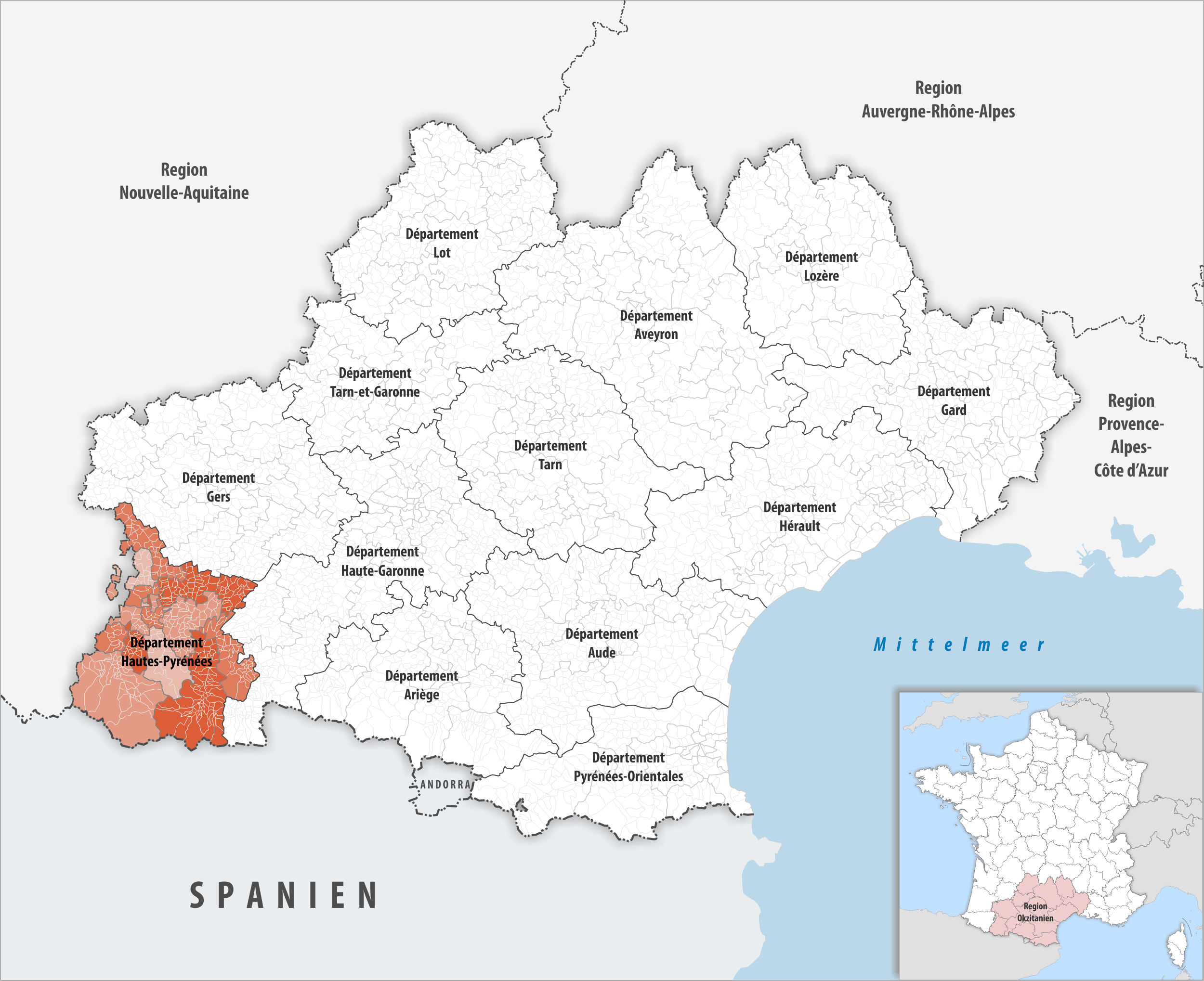 Lage des Departements Hautes-Pyrénées